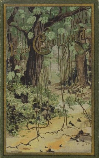 In den Kordilleren